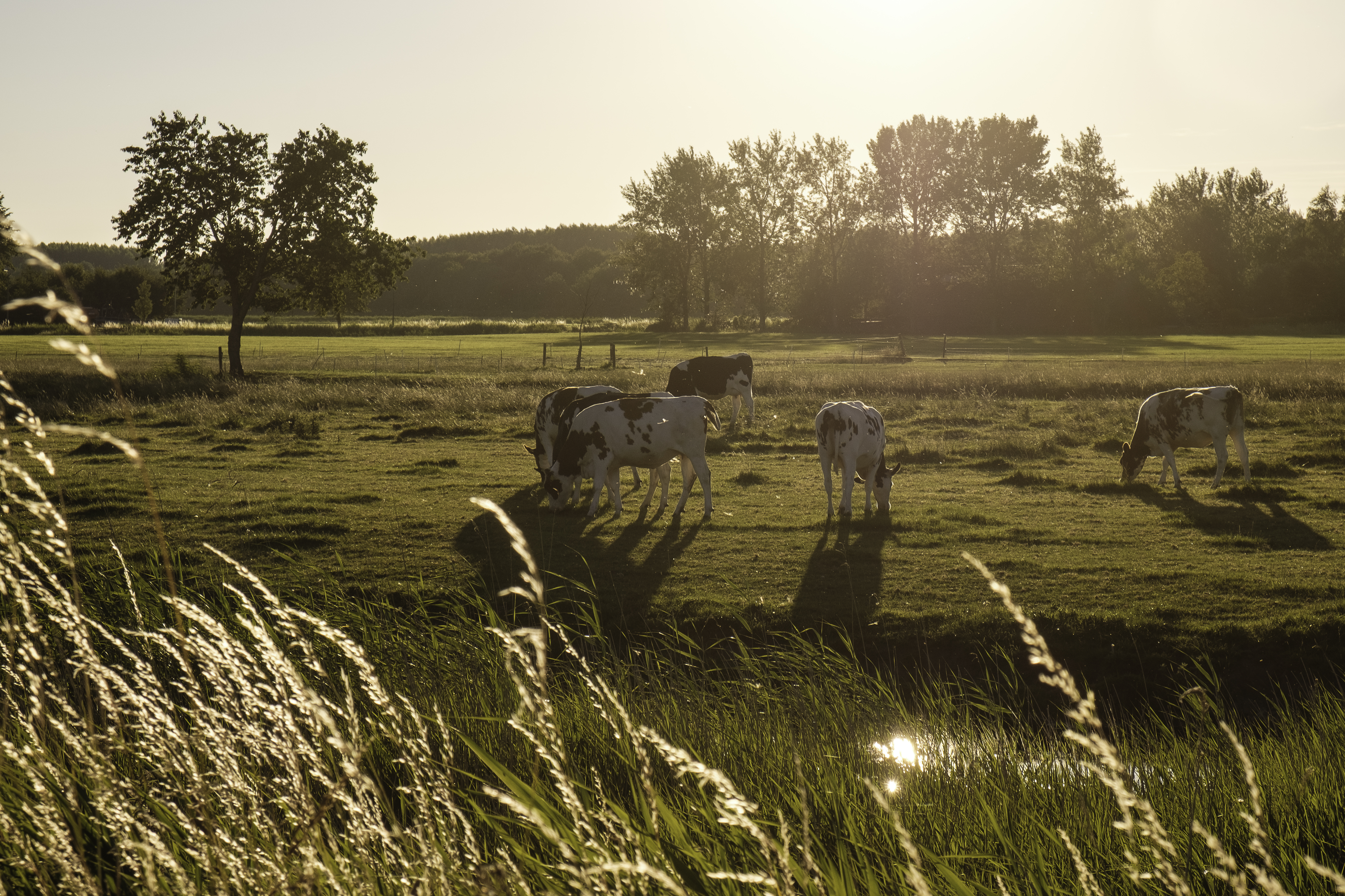 Koeien bij avond in een weiland ten oosten van Noorddijk in het oostelijkste deel van recreatiegebied Kardinge.